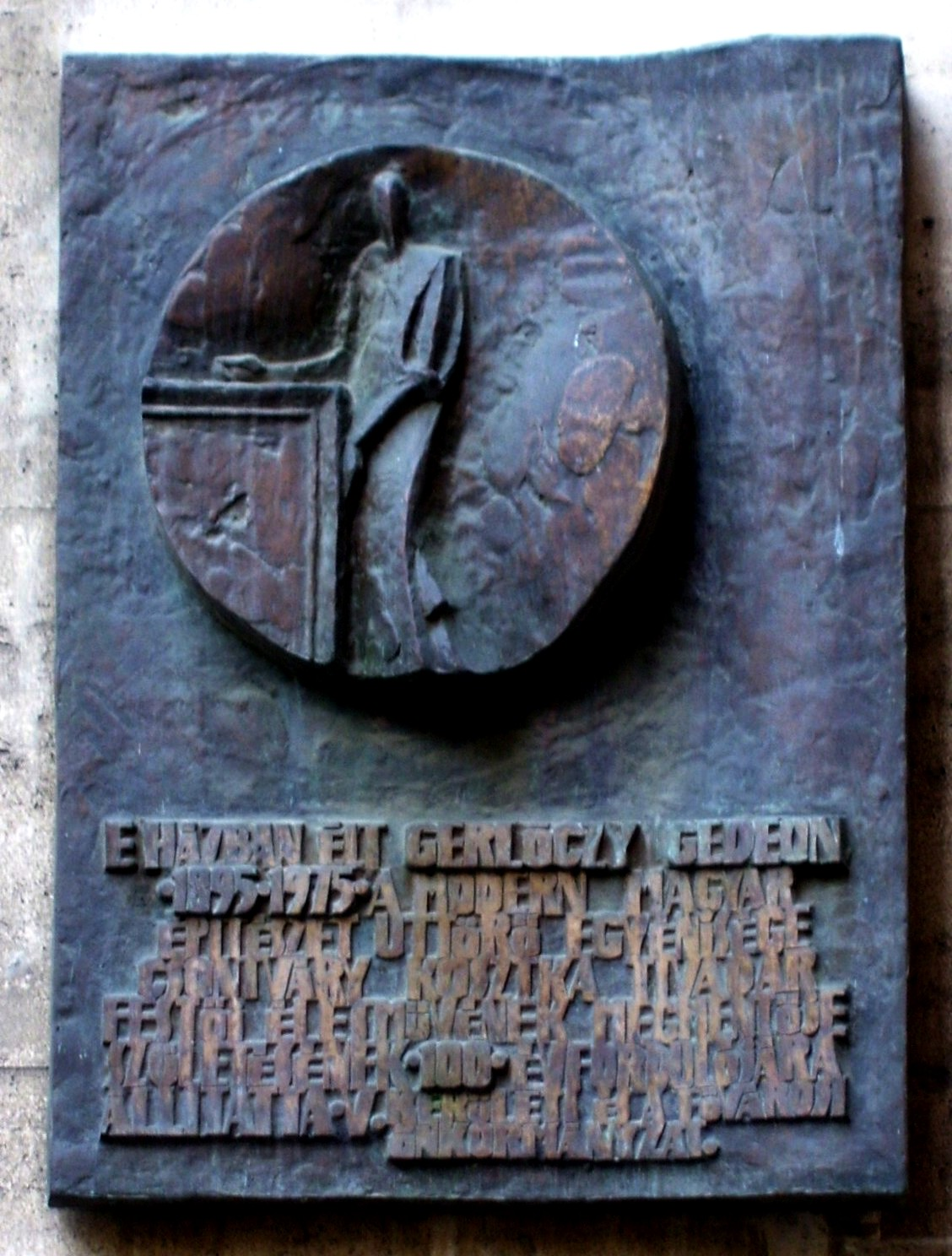 Gerlóczy G. emléktábla Bpest.V.Galamb utca 5. Czinder Antal alkotása